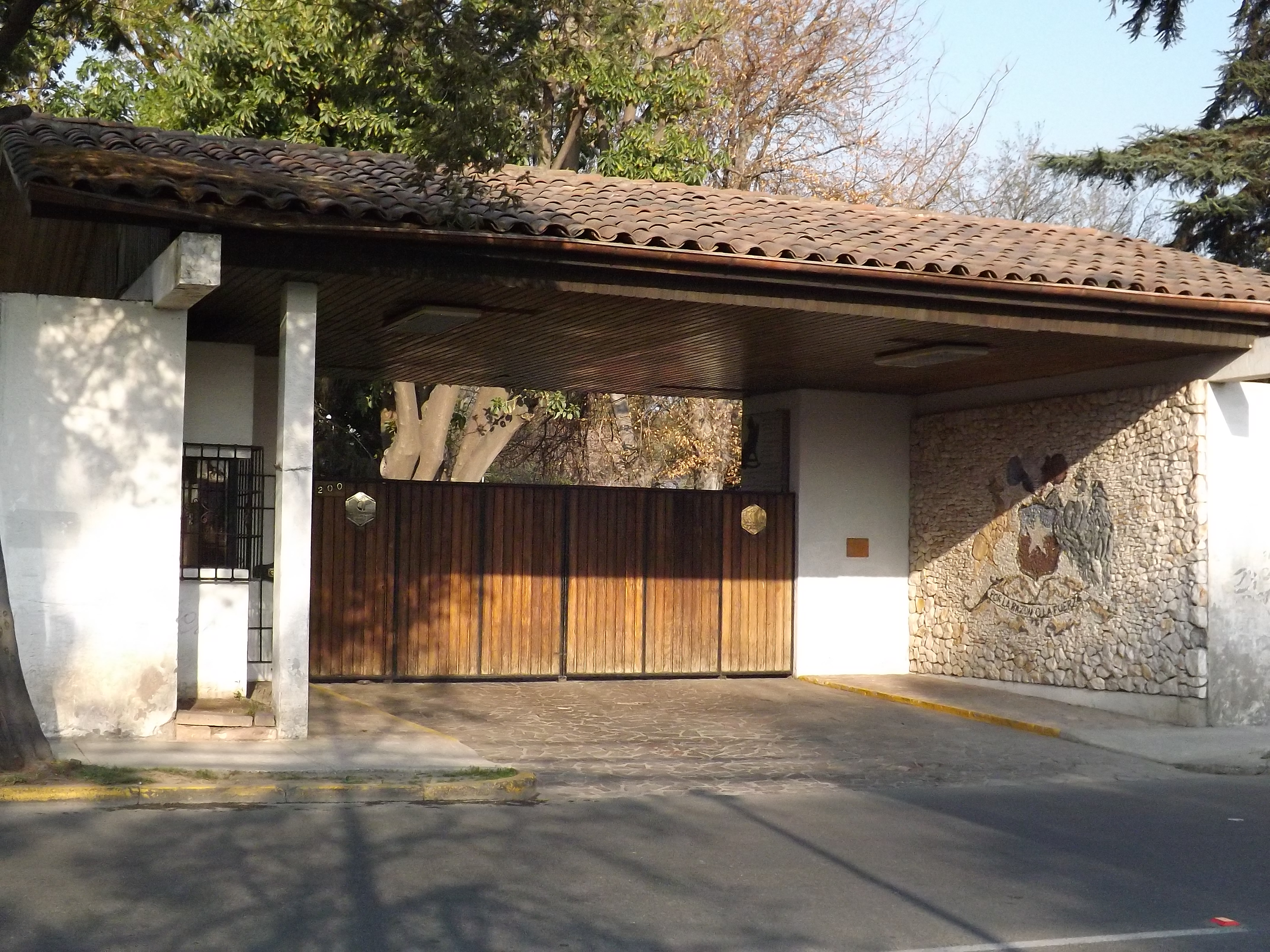 Entrada principal Casa Presidencial Tomás Moro que actualmente funciona como Hogar de Ancianos del Consejo Nacional de Protección a la Ancianidad, Conaprán